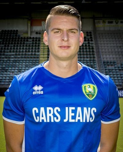 Tim Coremans